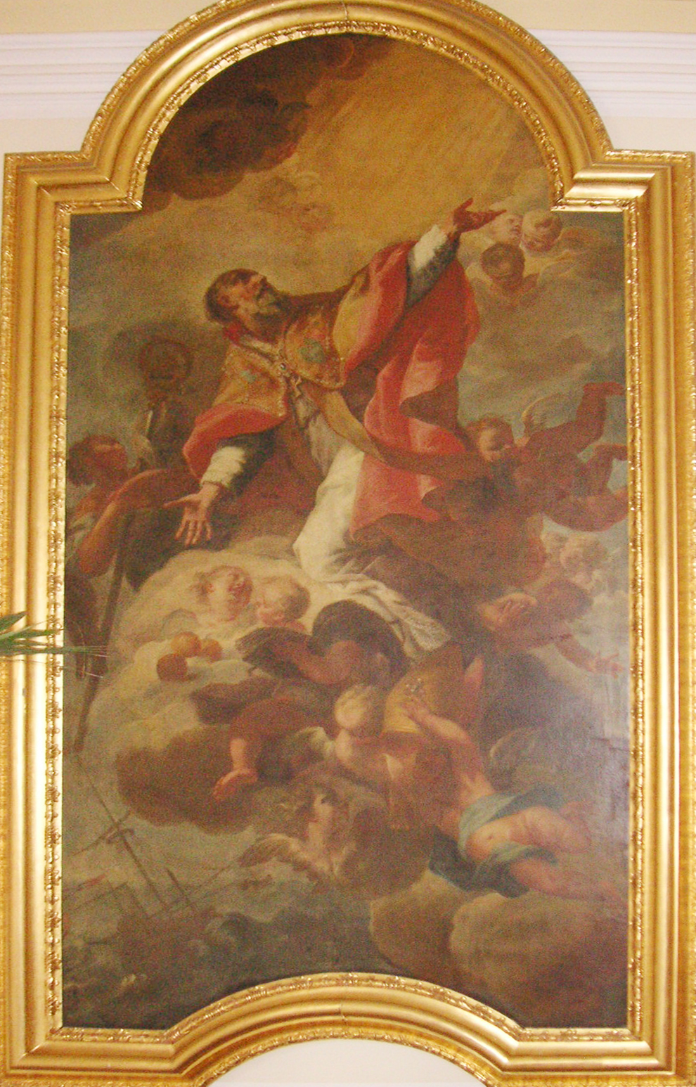 Dieses Altarbild befindet sich heute im Stigenaufgang des Rathauses von Stockerau: Altarbild hl. Nikloaus (Johann Georg Schmidt, um 1720) ursprünglich in der Kapelle des Jagdschlosses Schmida